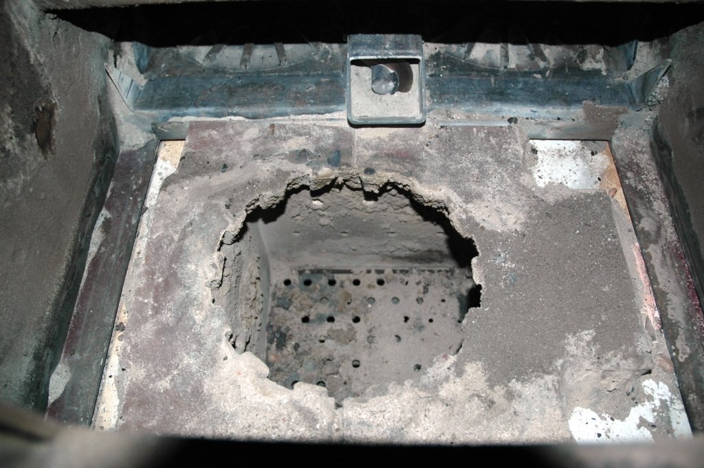 Brennerraum einer Holzhackschnitzelheizung der Firma Hargassner